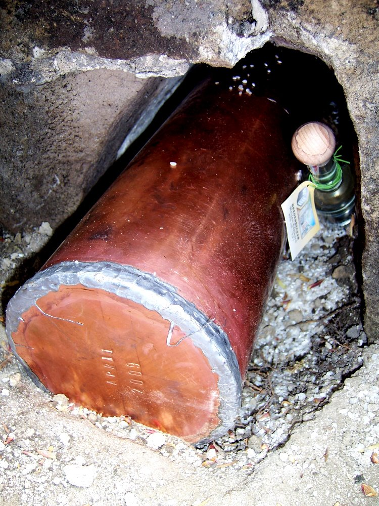 Zeitkapsel, die nach der Sanierung des Bredenbecker Denkmals 2009 eingesetzt wurde. Darin: Kopien der Fotos und Originaldokumente aus der ursprünglichen Zeitkapsel. Daneben eine Flasche Korn der örtlichen Brennerei. Verschweißtes Kupferrohr.